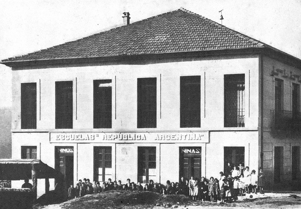 Edificio do concello, xulgado e escolas de Cortegada inaugurado en 1936, coa doazón de Guillermo Álvarez, fotografía en Vida Gallega 1936